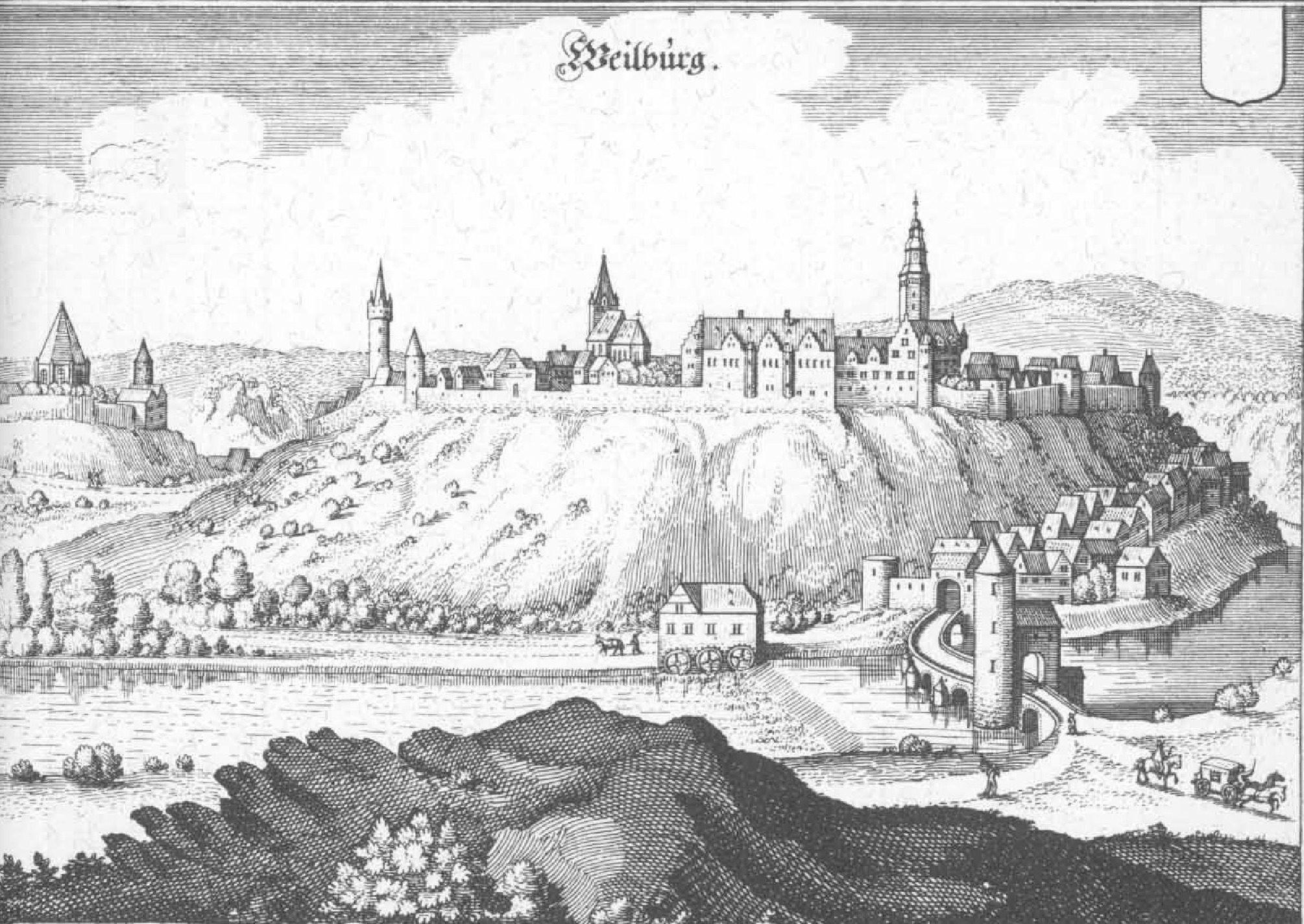 Dies ist Ausschnitt eines Scan des historischen Buches